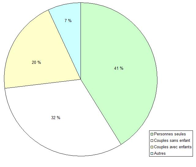 Compisition des foyers de Gladstone (Manitoba, Canada).